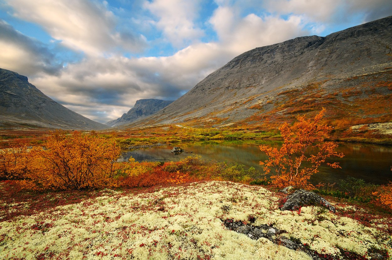 Хибины, в сентябре 2012 This image is related to the protected area of Russia number 5100013